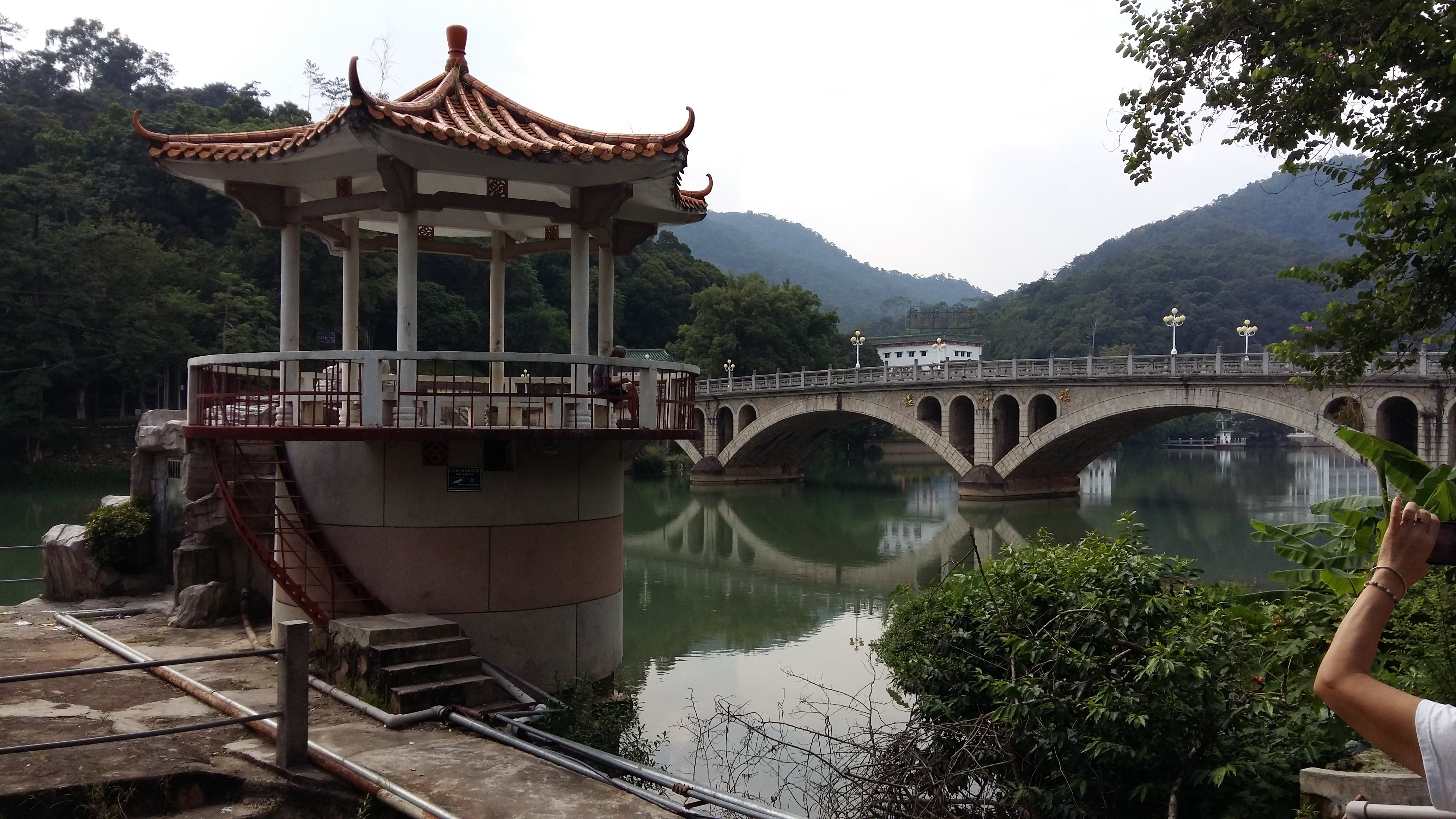 粵語: 喺從化温泉流溪河邊個涼亭